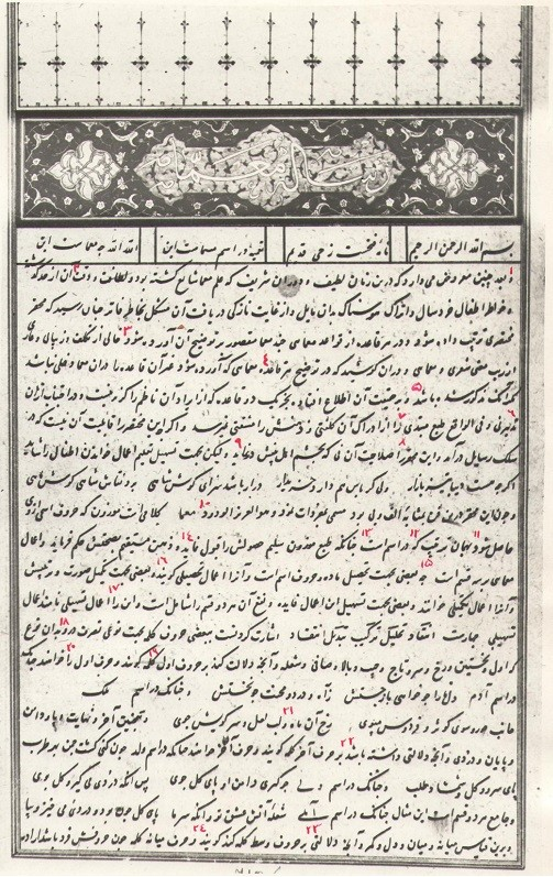 تصویر صفحه نخست نسخه ای خطی از رساله مفردات